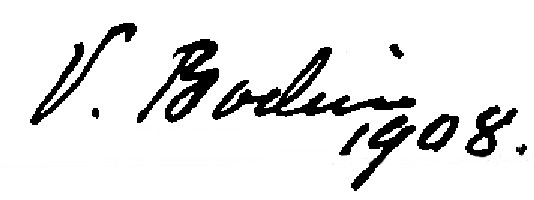 Arkitekt Victor Bodin, namnteckning 1908